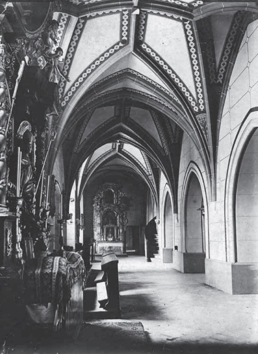 Severna stranska ladja leta 1892